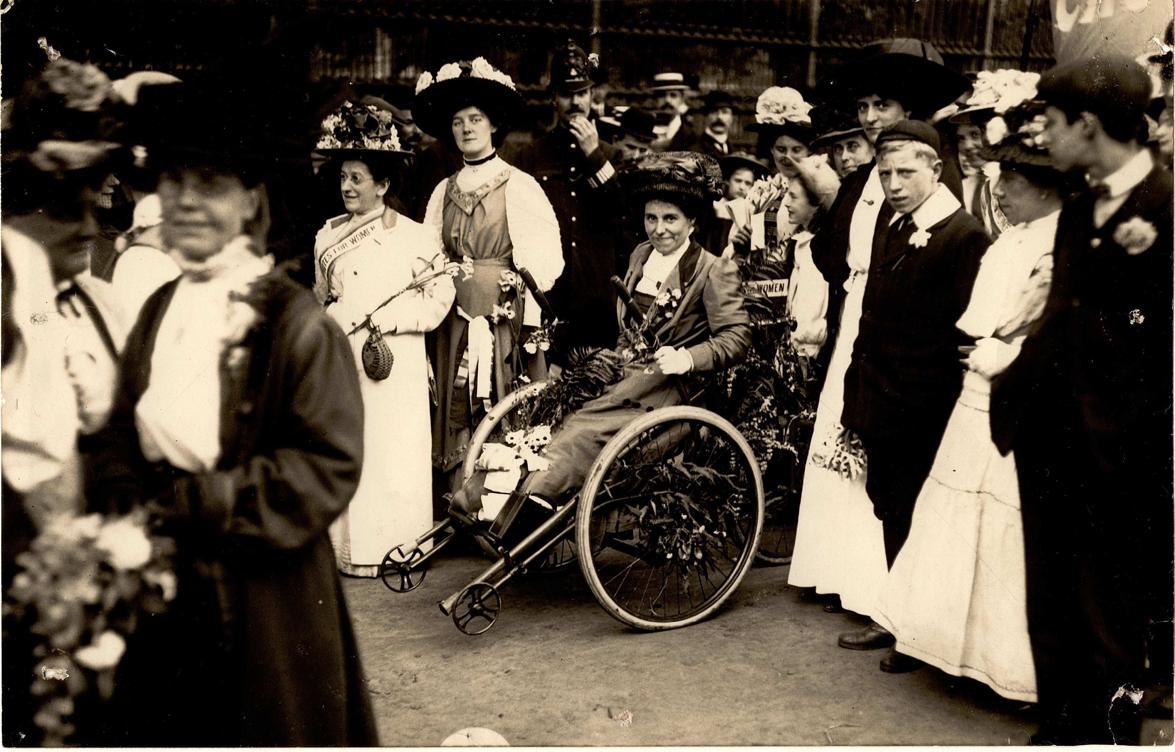 7ewd j 55